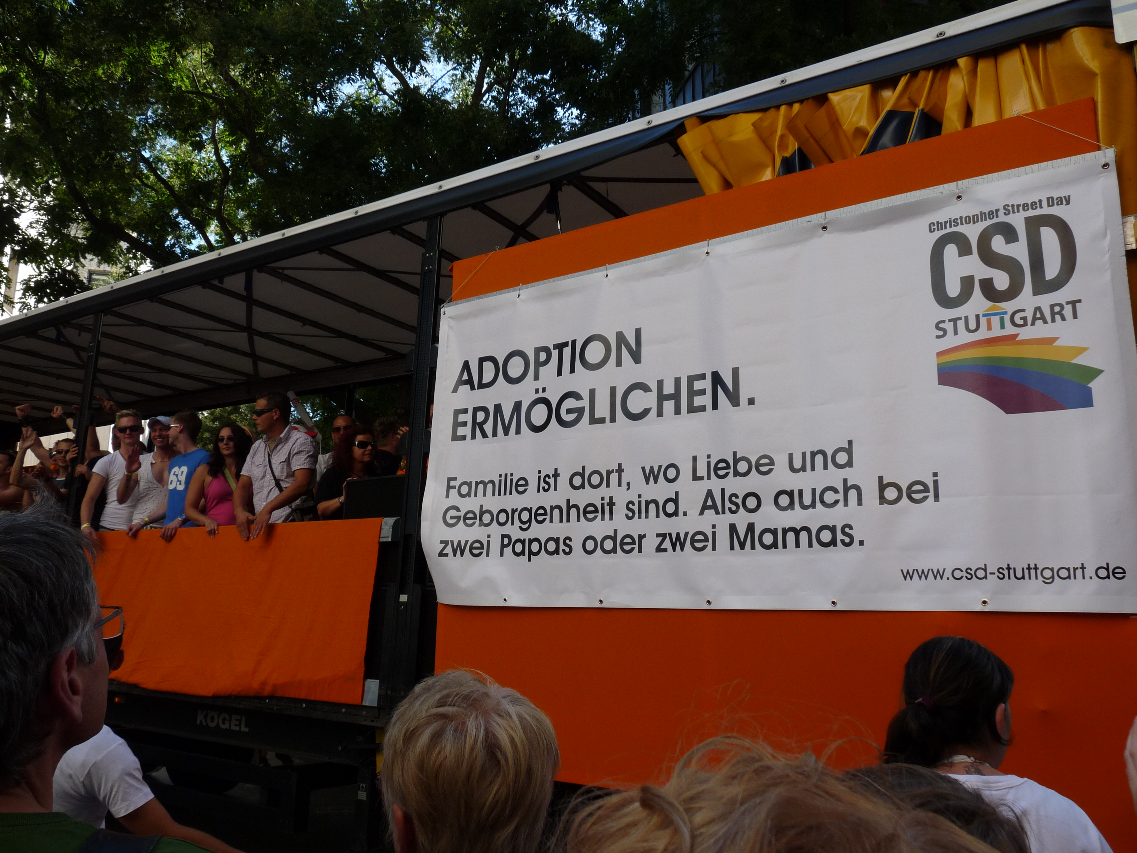 Stuttgart_-_CSD_2009_-_Parade